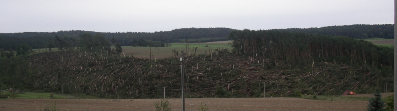 Tornadoschneise Quirla